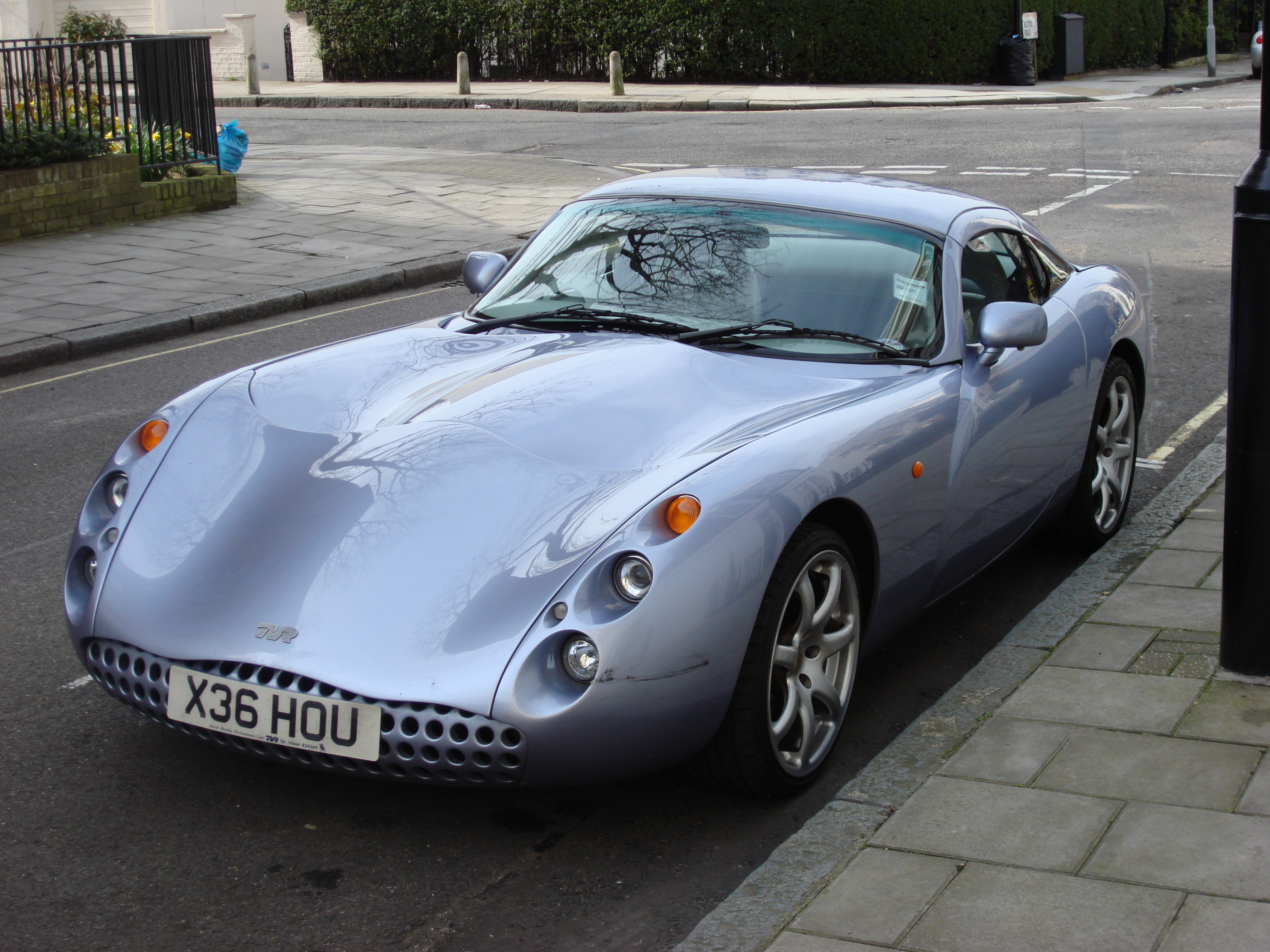 TVR